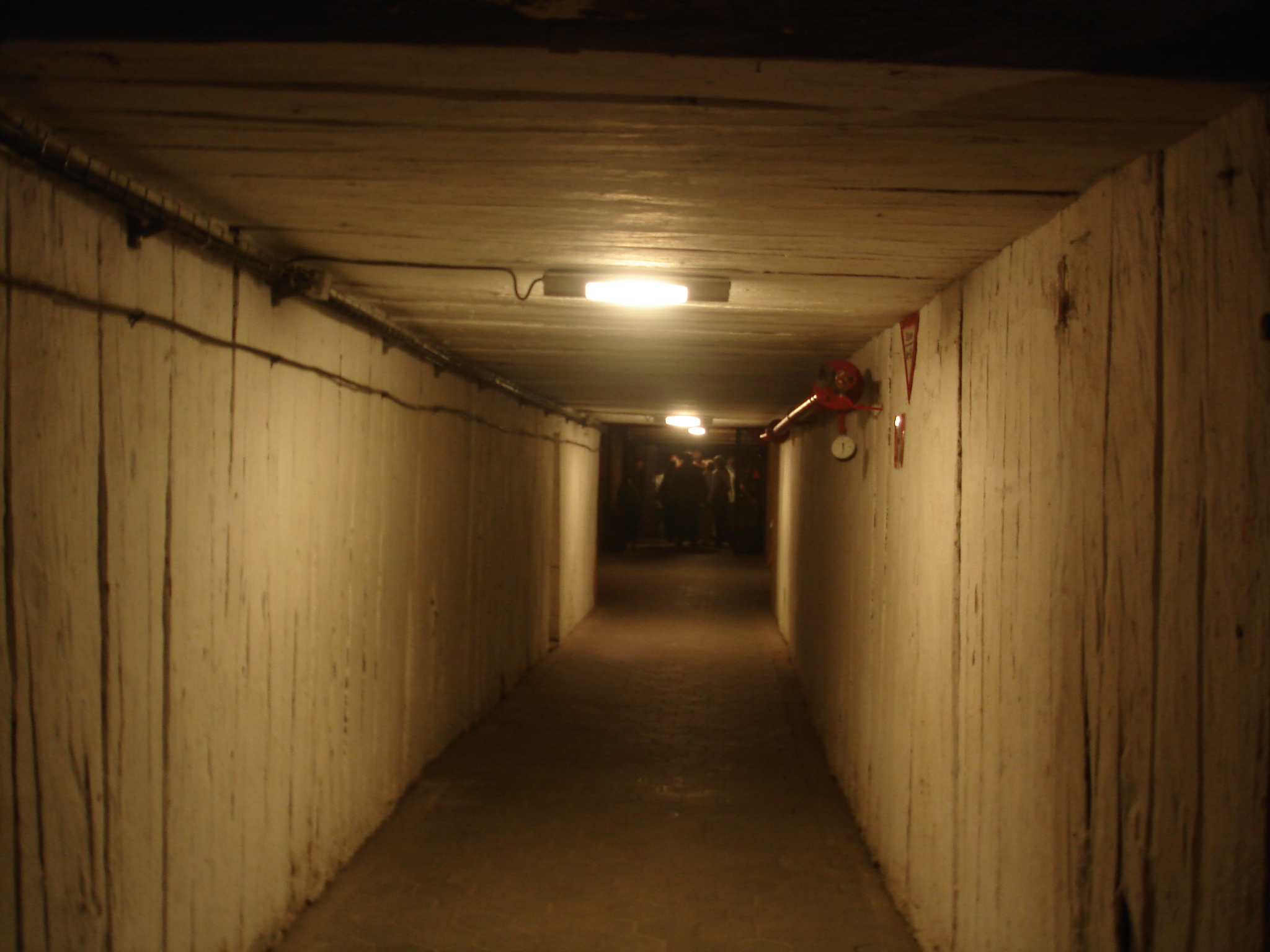 Wieliczka, Poland